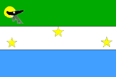 Bandera del municipio José Felipe Márquez Cañizales. Estado Trujillo. Venezuela